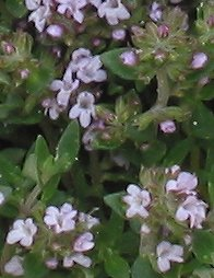 zelfgemaakte foto van Steentijm op Texel in duinrand; eind mei